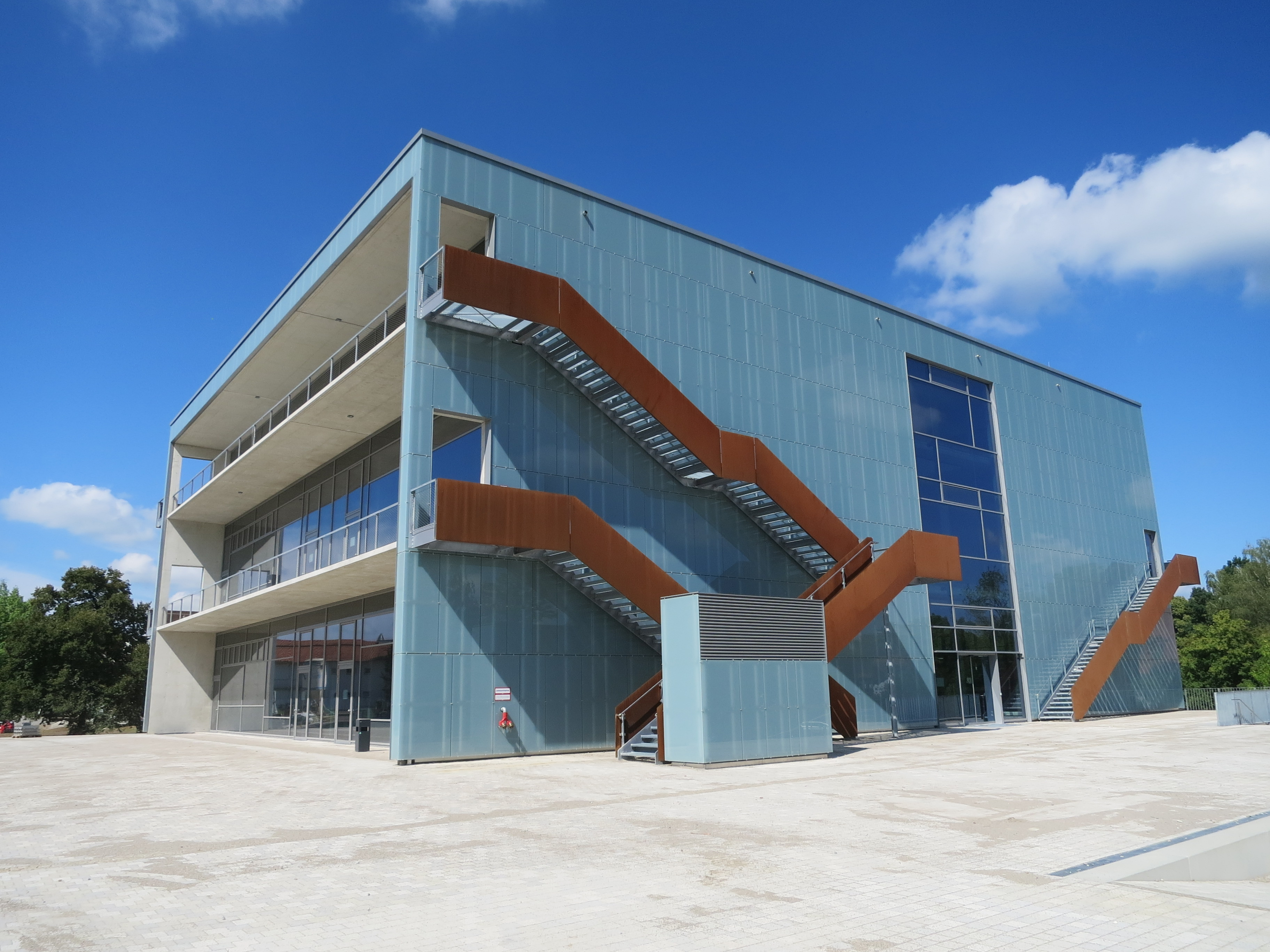 Dieses wichtige Gebäude der HSWT wurde im Herbst 2017 endgültig fertig